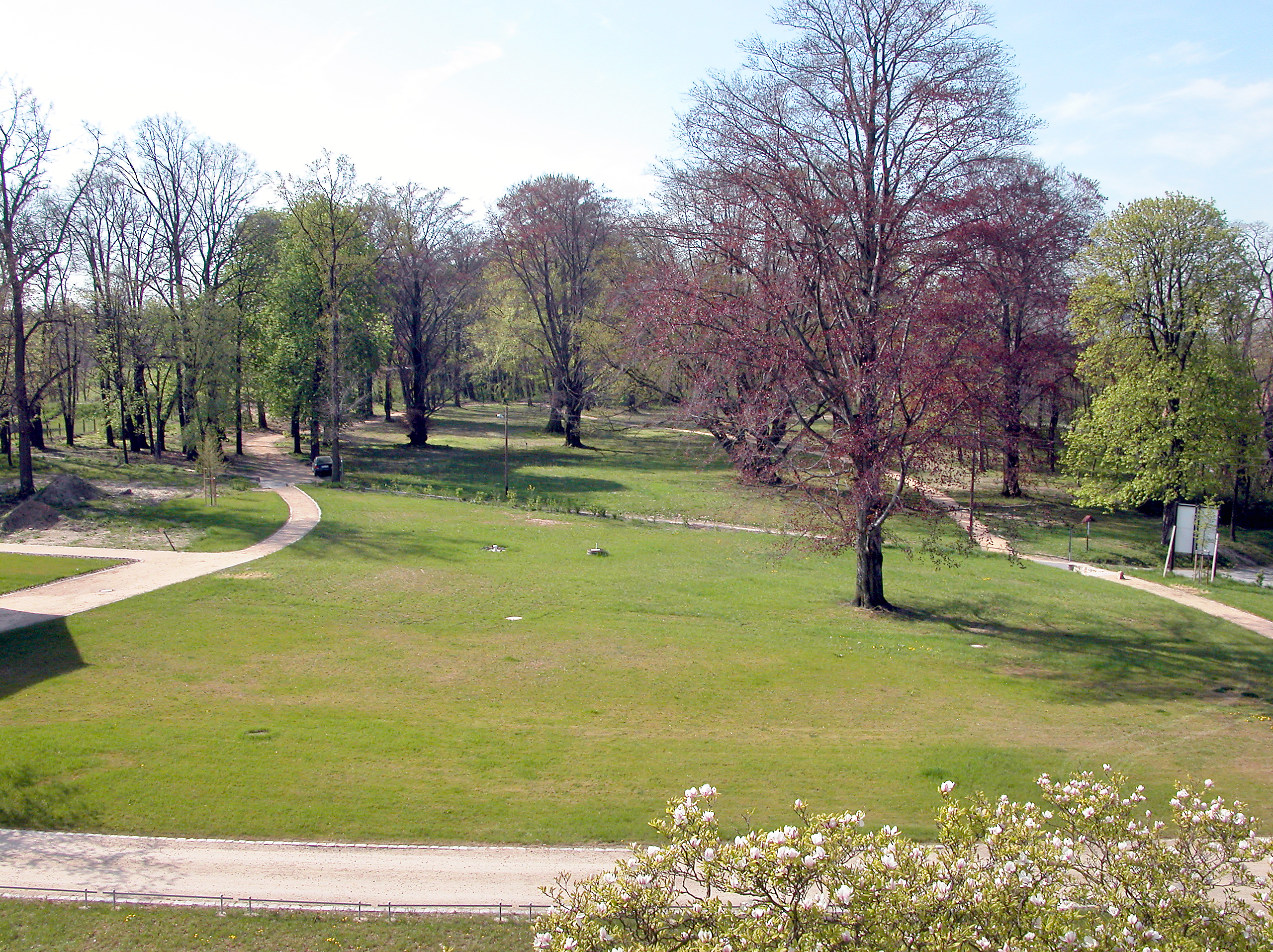 23.04.2007 02894 Krobnitz (Reichenbach): Blick vom Schloß nach Westen in den Park.